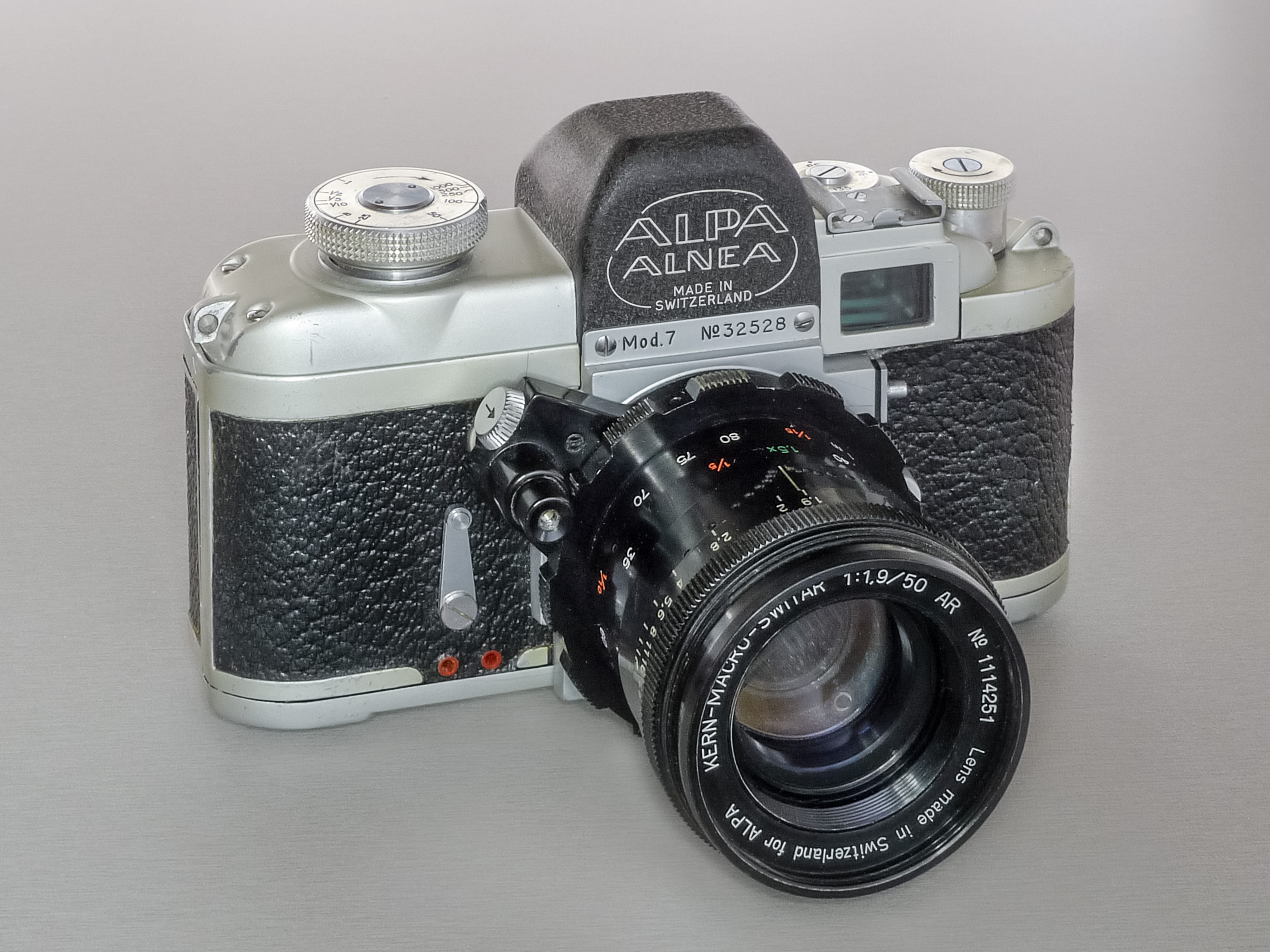 Alpa Alnea Modell 7 mit Kern Macro-Switar 1:1,9/50mm